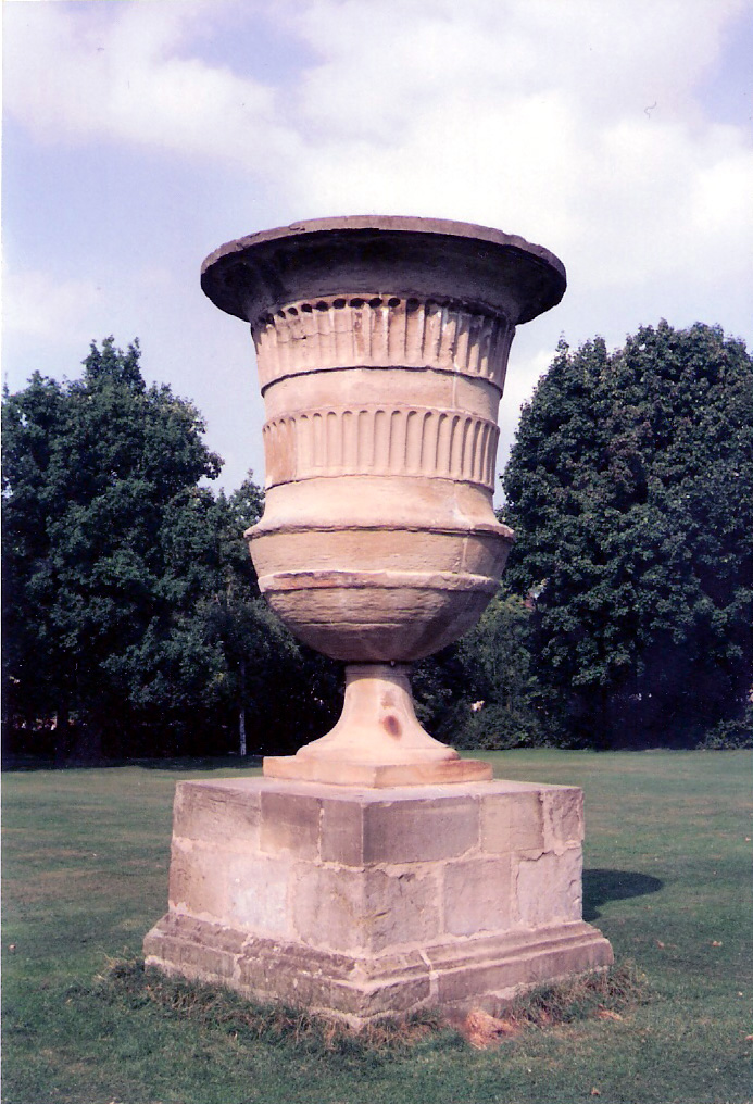 Antonio Isopi: Monumentalvase Schloss-Park Ludwigsburg (ehemals Bärenwiese)